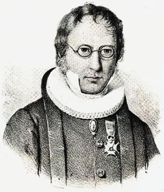 Den norske teologen Svend Borchmann Hersleb (1784–1836).